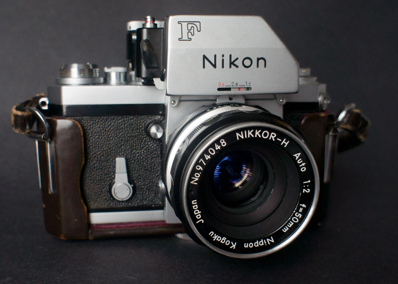 From local CL.